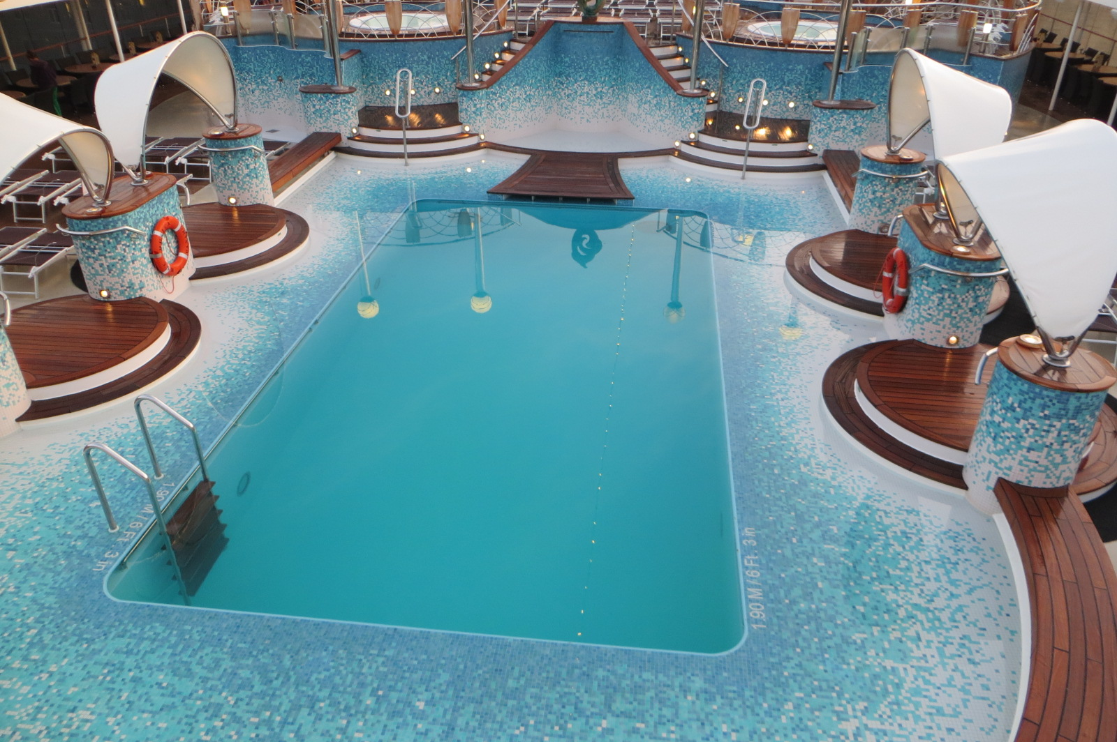 Cruzeiro a bordo do MSC Musica